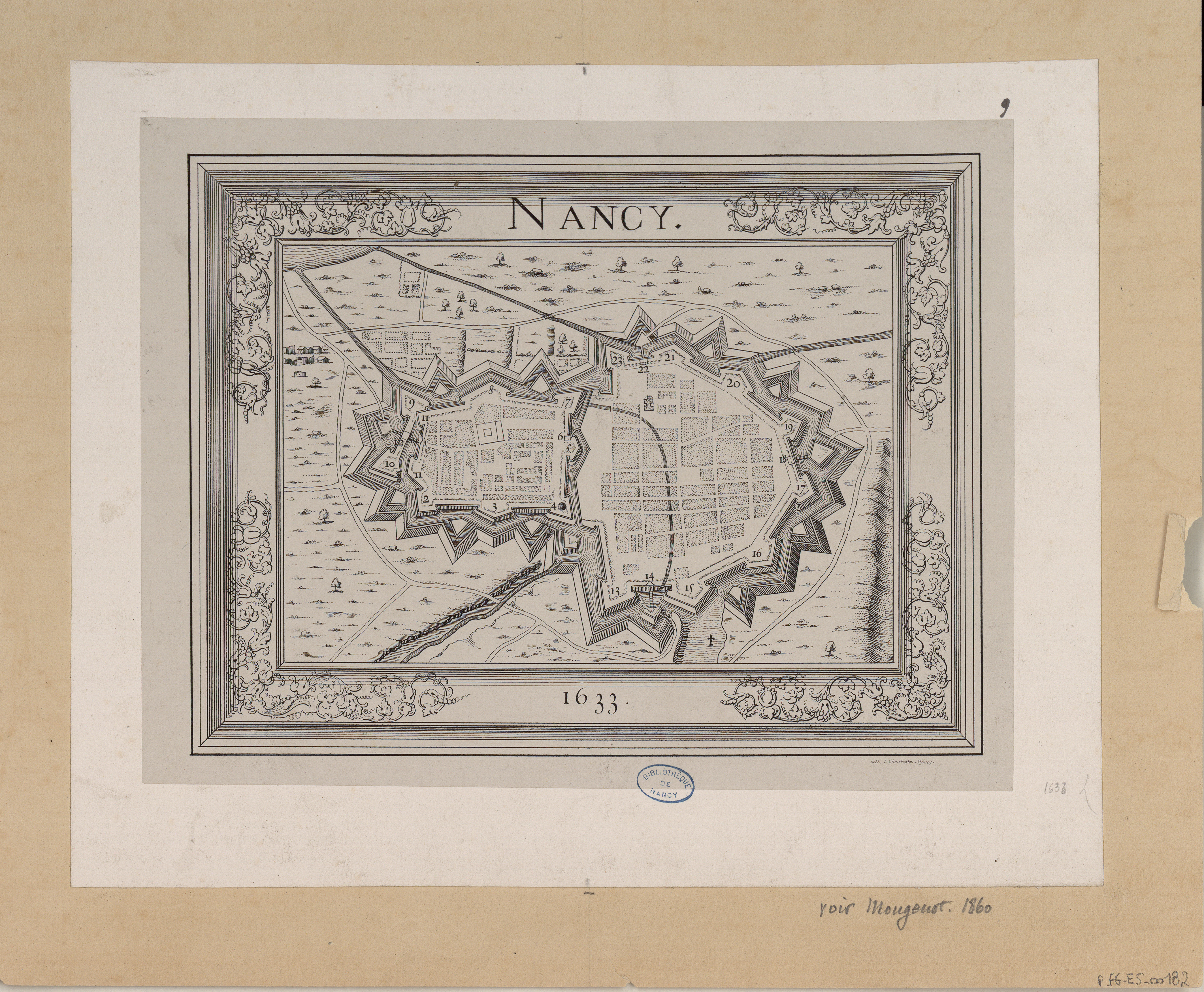 Plan d'après Anthoine de Fer publié dans Mémoires de la Société d'archéologie Lorraine" 1860 ( Légende du plan : 1 - Porte Notre-Dame (porte de la Craffe) 2 - Bastion de Danemark 3 - Bastion de Salm 4 - Bastion des Michottes (Notre-Dame) 5 - Bastion d'Haussonville 6 - Porte Saint-Nicolas entre les deux villes 7 - Bastion de Vaudémont 8 - Bastion des Dames (de la Cour) 9 - Bastion le Duc 10 - Bastion le Marquis 11 - Retranchements 12 - Porte Notre-Dame (des champs ?) 13 - Bastion Saint-Jean 14 - Porte Saint-Jean 15 - Bastion Saint-Thiébaut 16 - Bastion de Saulru (Saurupt) 17 - Bastion Saint-Nicolas 18 - Porte Saint-Nicolas 19 - Bastion de Haraucourt 20 - Bastion de la Madeleine 21 - Bastion de Saint-Georges 22 - Porte Saint-Georges 23 - Bastion Saint-Jacques